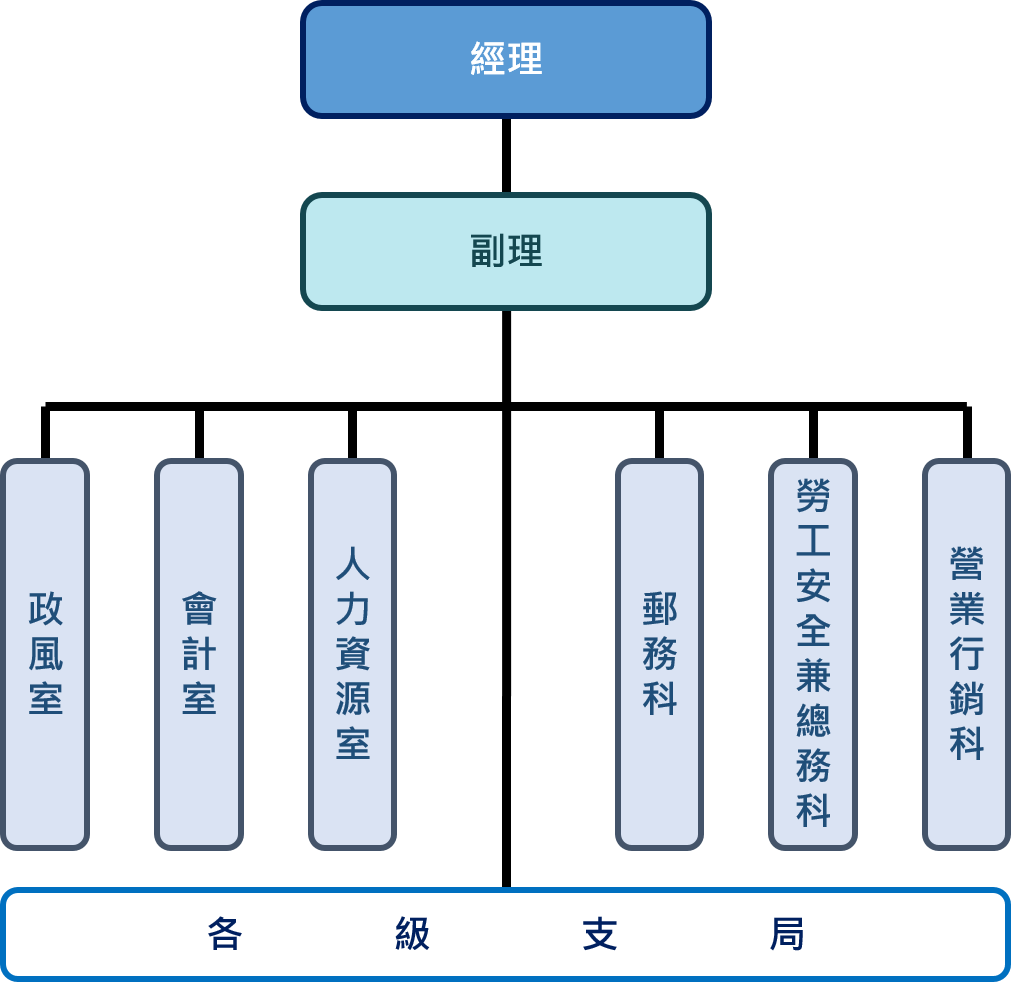 中文（台灣）: 中華郵政臺東郵局組織架構